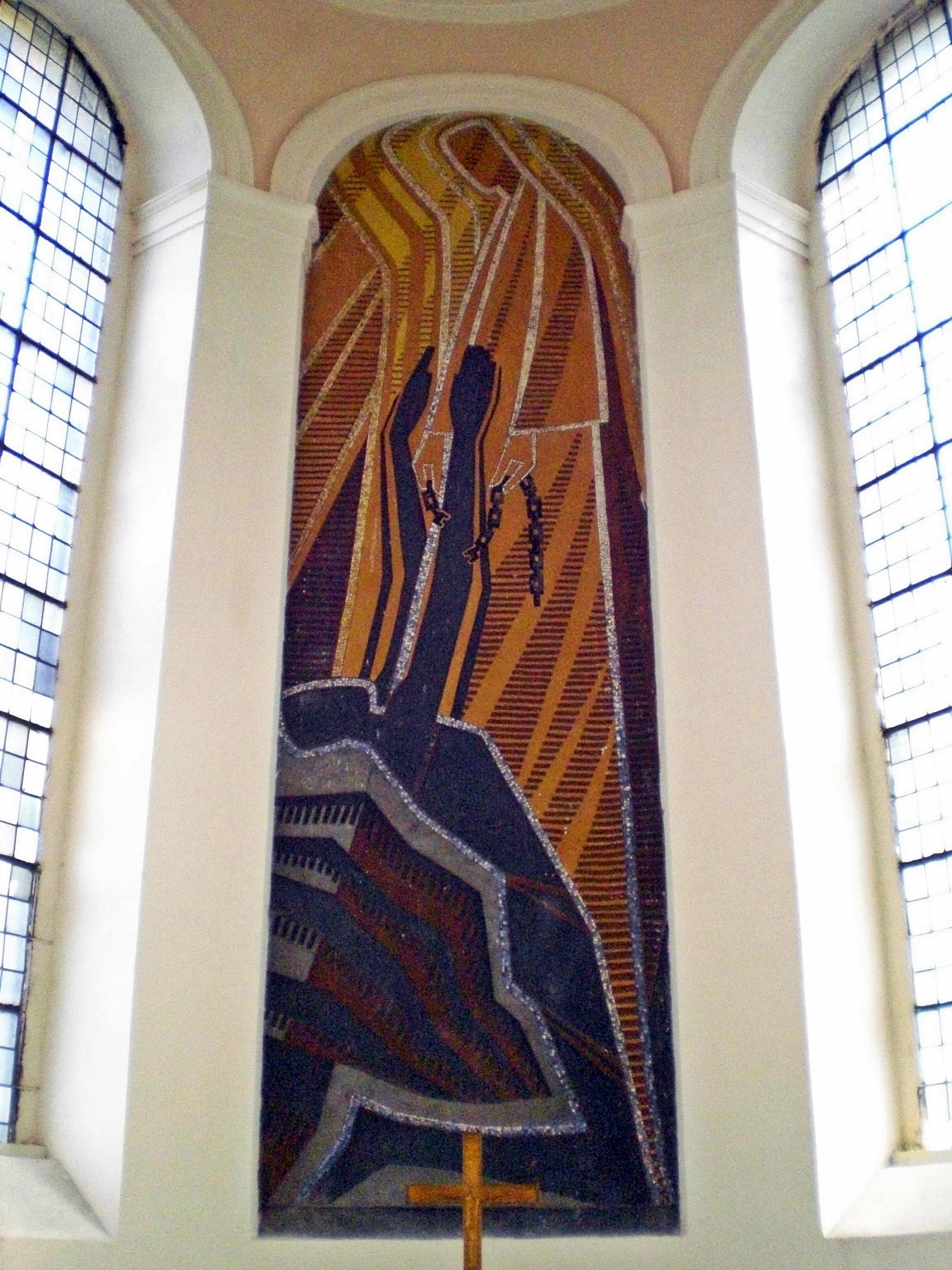 Günter Johl, "Durchbrecher aller Bande", Sgraffito für die St. Nicolai-Kirche in Magdeburg, 1954. Die Abbildung zeigt den Zustand des Kunstwerks von 2009.